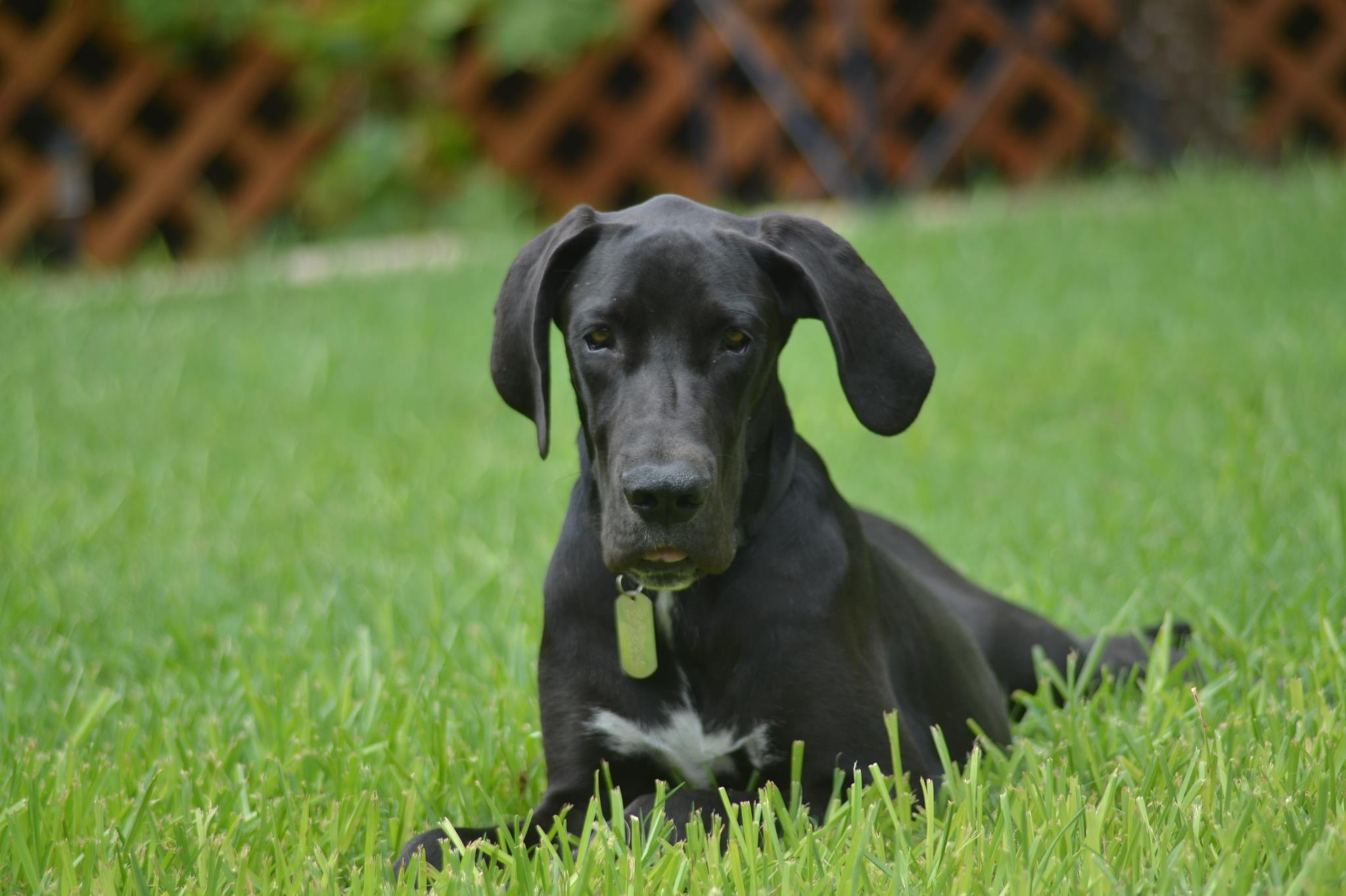 Pequeño Gran danés de 5 meses, color negro.